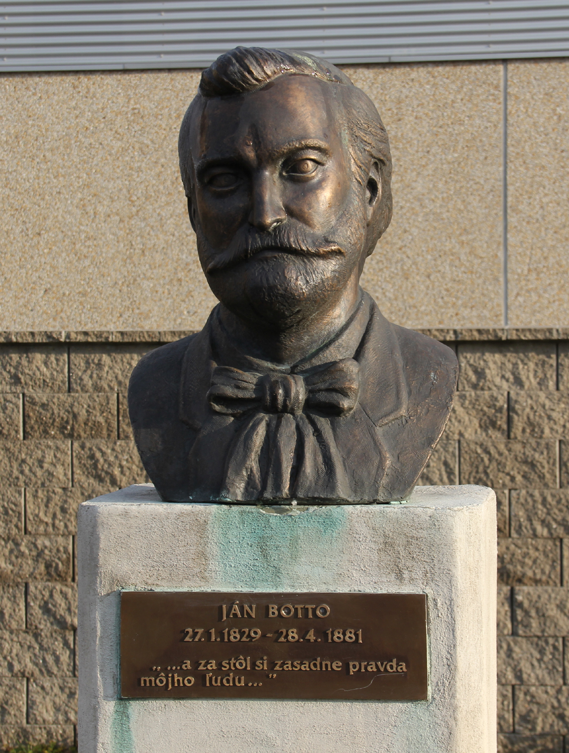 Bronzová busta slovenského básnika Jána Botta na Námestí Štefana Marka Daxnera v Rimavskej Sobote